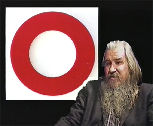 Portrait de Olivier Mosset